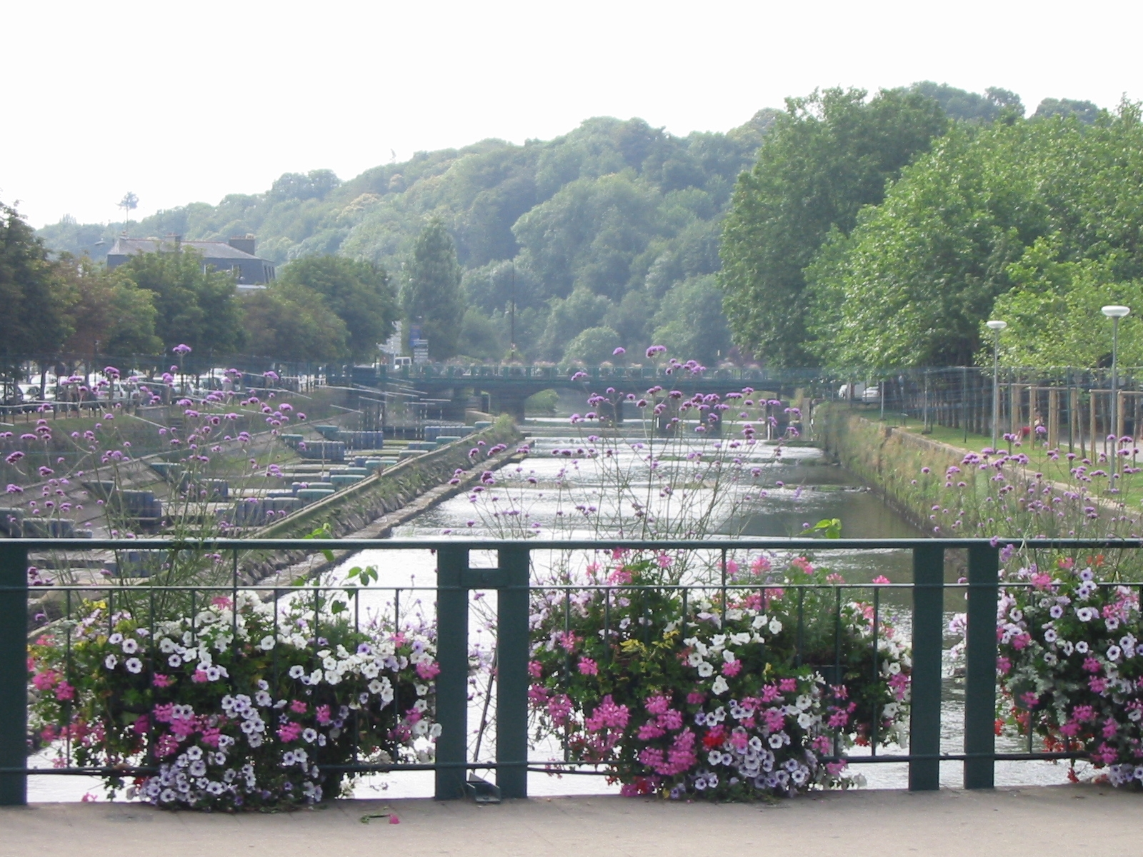 Pont sur la rivière Le Léguer, à Lannion en Bretagne.